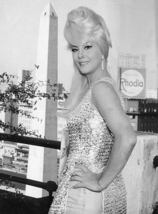 Libertad Leblanc en la película La culpa.